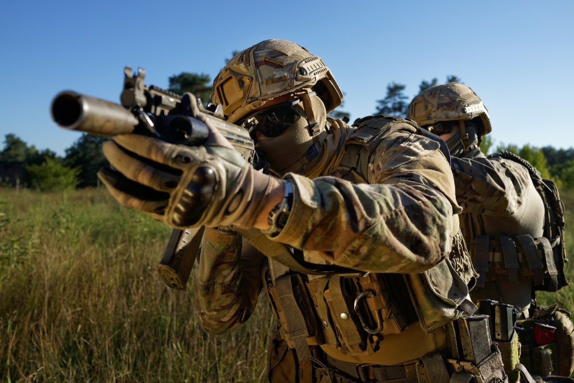 Фотогалерея ССО